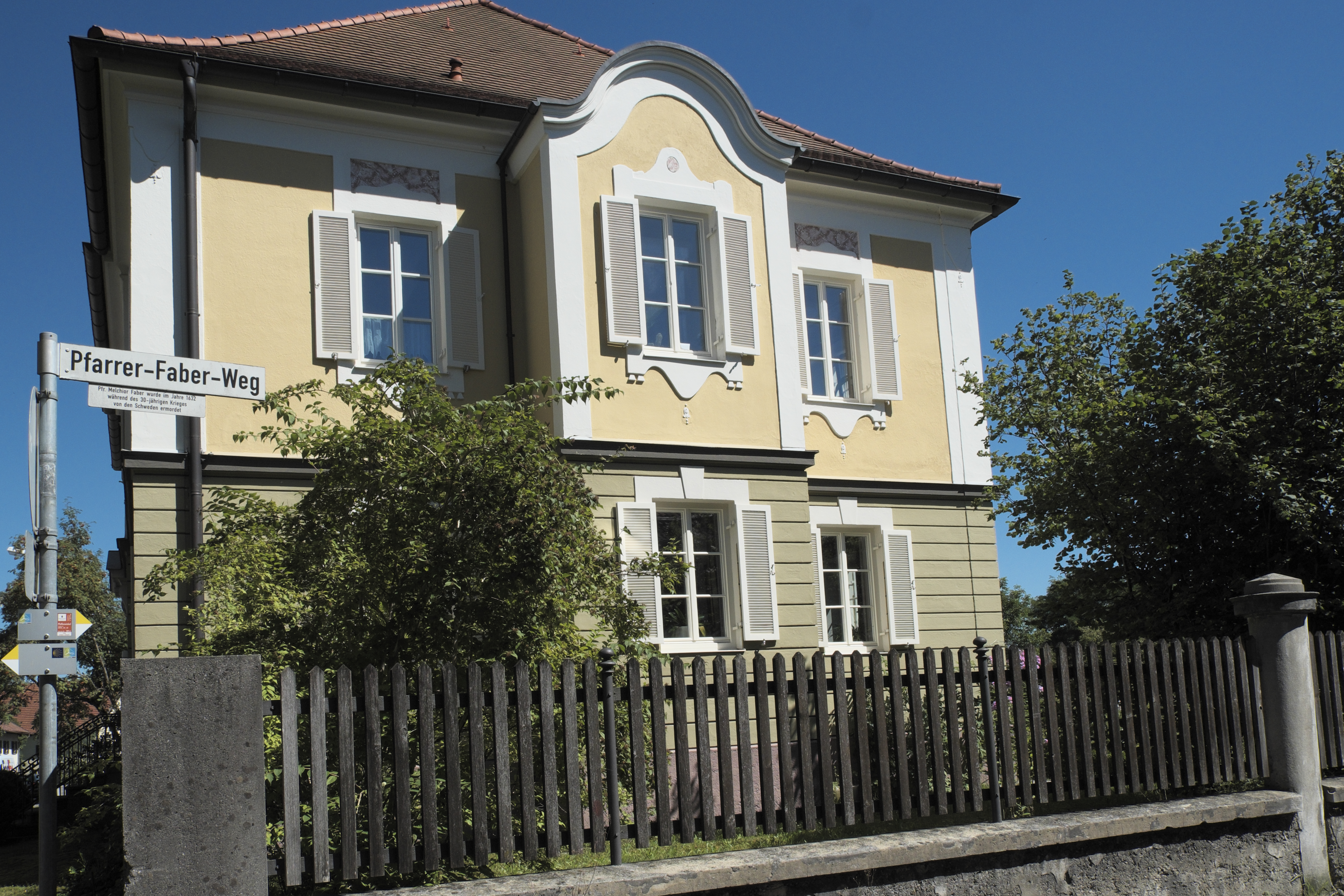 Pfarrhaus in Peißenberg im Landkreis Weilheim-Schongau (Bayern/Deutschland)